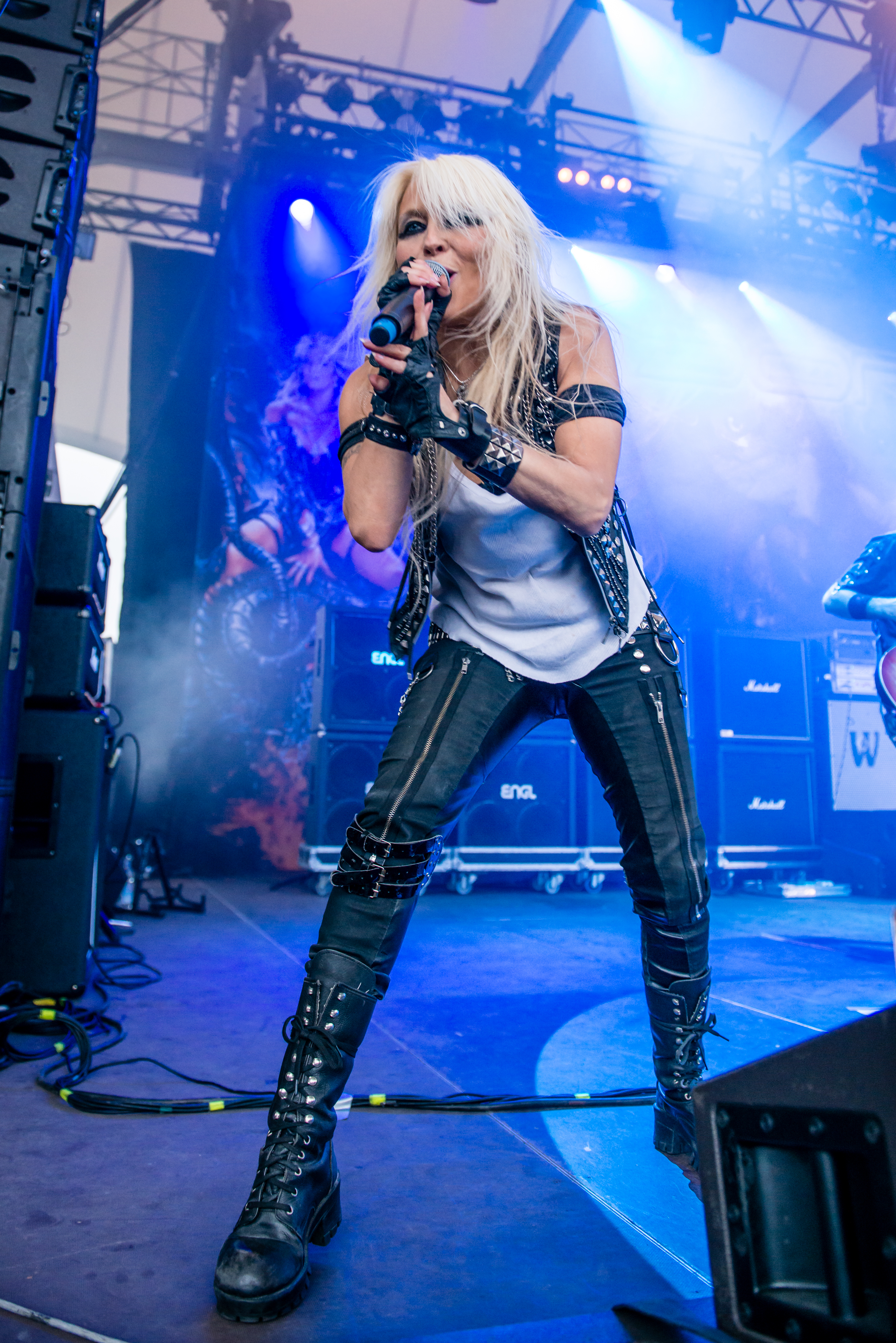 'Rock Hard Festival 2015; Gelsenkirchen Amphitheater': 'Doro'